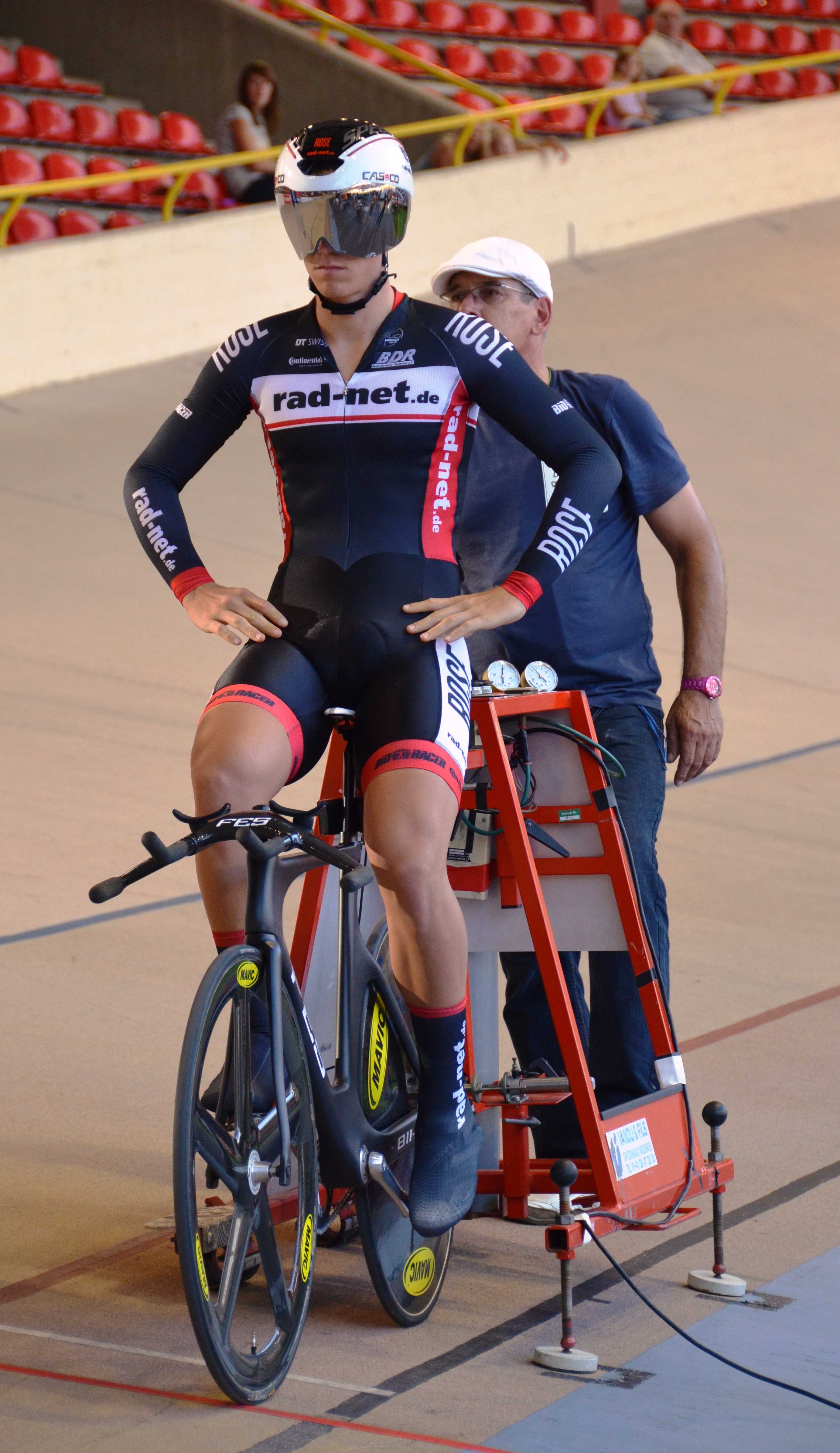 Pascal Ackermann, deutscher Radsportler The making of this document was supported by the Community-Budget of Wikimedia Germany.